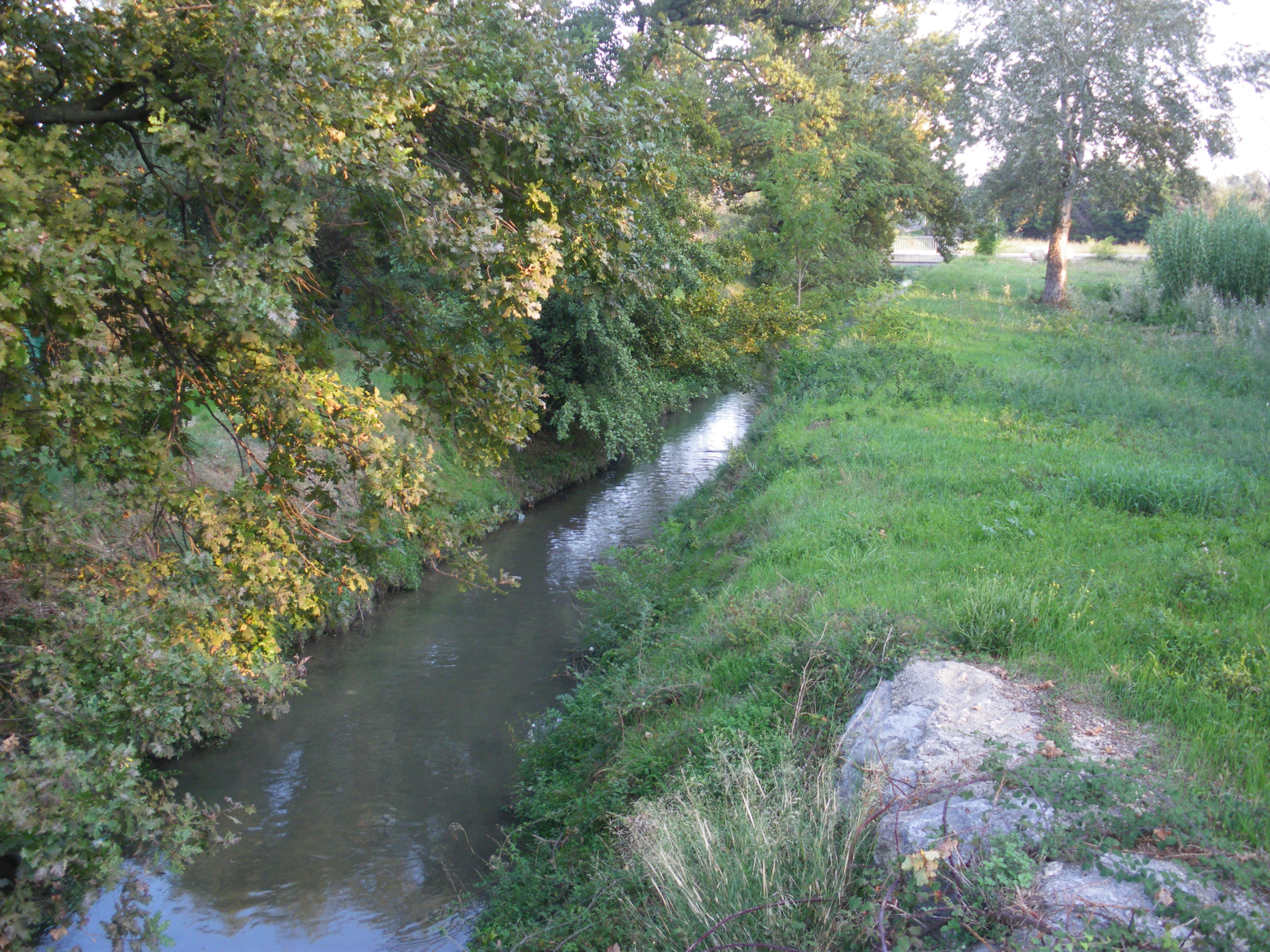 Canal du Crillon, Vaucluse, France